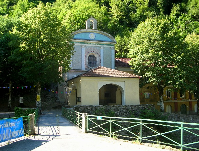 Foto propria Agosto 2008 Valbrevenna (Genova) - Santuario della Madonna dell'Acqua